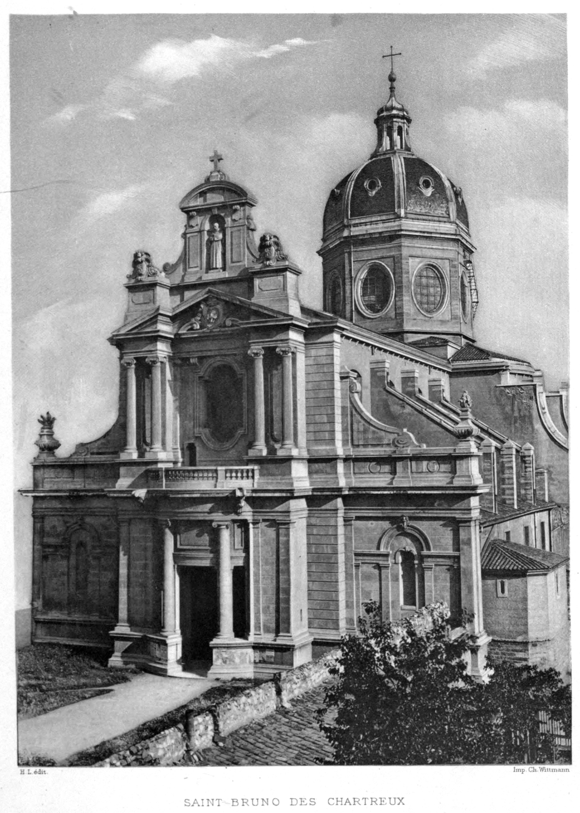 Illustrations pour l'Histoire des églises et chapelles de Lyon